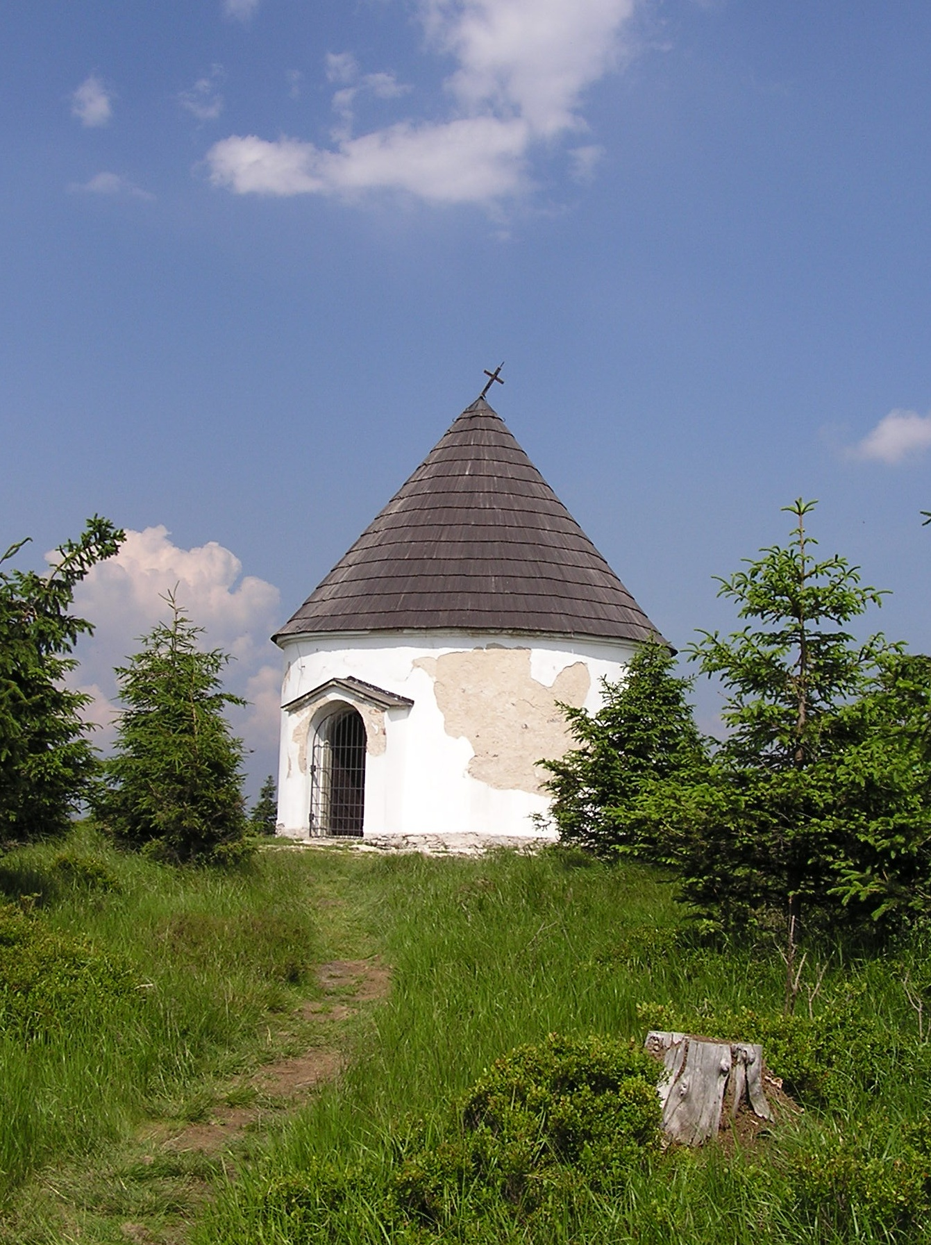 Česky: Kunštátská kaple na hřebeni Orlických hor